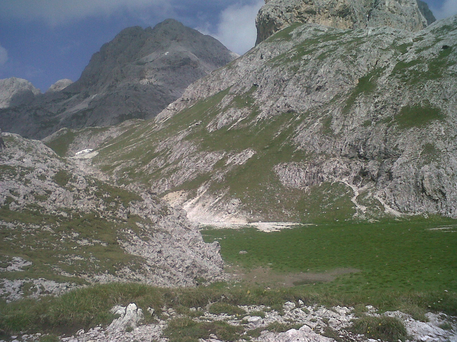 Il vallone di Laussa nel Gruppo del Catinaccio, subito dopo il Passo delle Scalette.